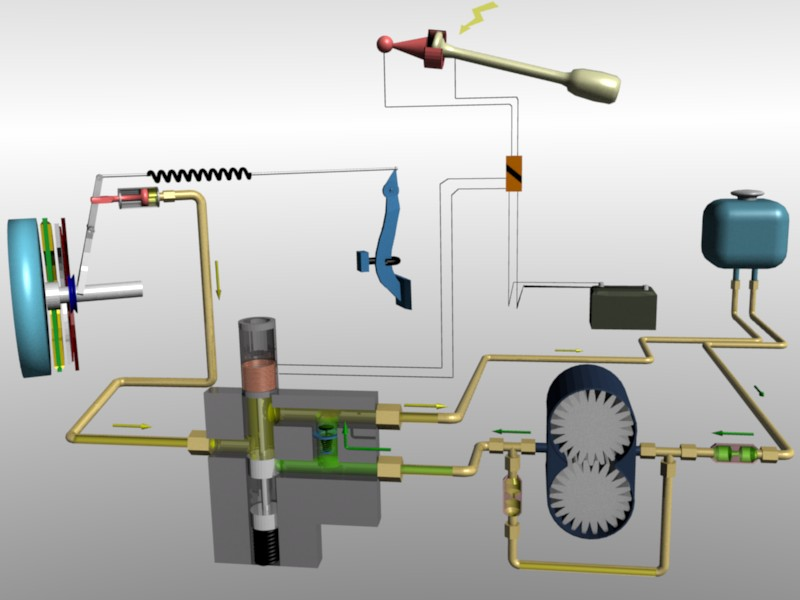 Schaltvorgang beim Hycomat